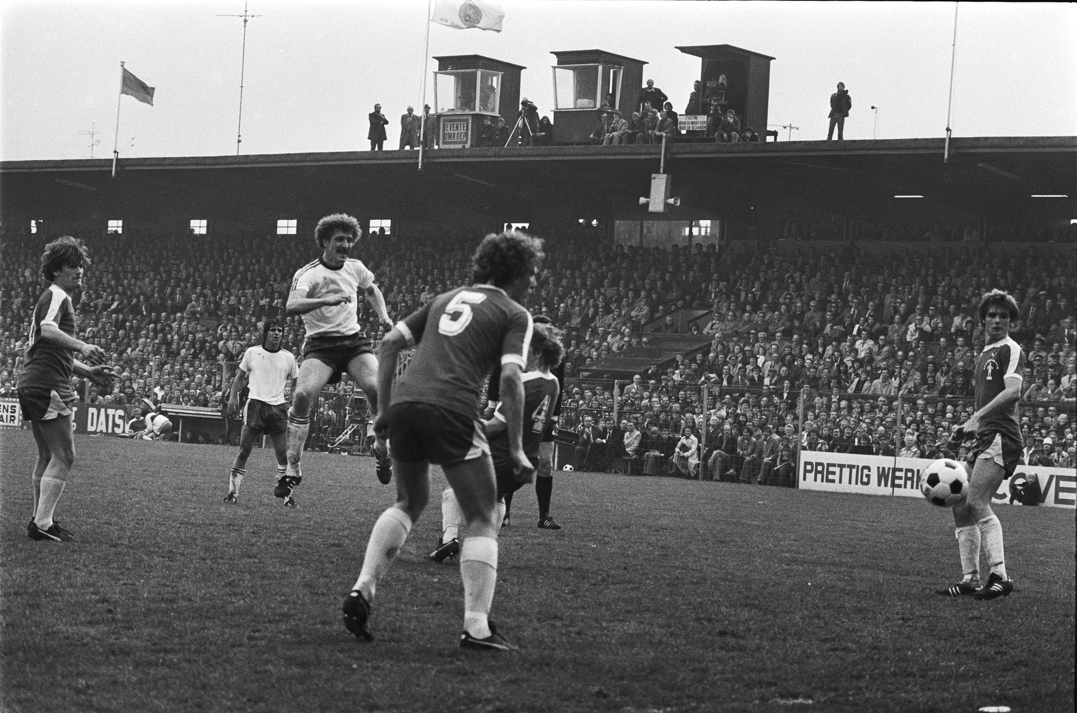 Collectie / Archief : Fotocollectie Anefo Reportage / Serie : [ onbekend ] Beschrijving : Go Ahead Eagles tegen FC Amsterdam 2-0, Stef Walbeek (l) scoort eerste doelpunt, no. 5 is Theo Swart, rechts Heini Otto Datum : 30 april 1978 Trefwoorden : sport, voetbal Persoonsnaam : Otto, Heini, Swart, Theo, Walbeek, Stef Instellingsnaam : FC Amsterdam, Go Ahead Eagles Fotograaf : Verhoeff, Bert / Anefo Auteursrechthebbende : Nationaal Archief Materiaalsoort : Negatief (zwart/wit) Nummer archiefinventaris : bekijk toegang 2.24.01.05 Bestanddeelnummer : 929-6938